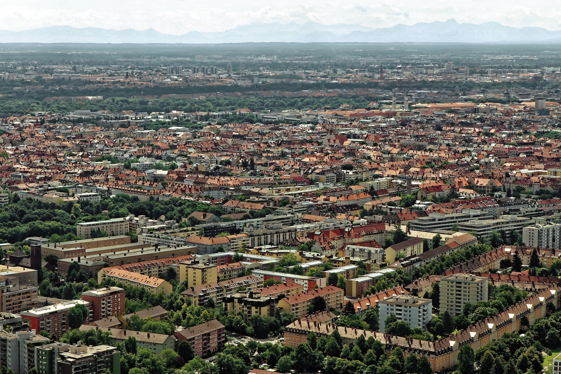 Wikipedia im Landtag – Bayern 17. bis 19. Juli 2012 in München Dieses Foto wurde im Rahmen des Projektes „Wikipedia im Landtag“ erstellt.